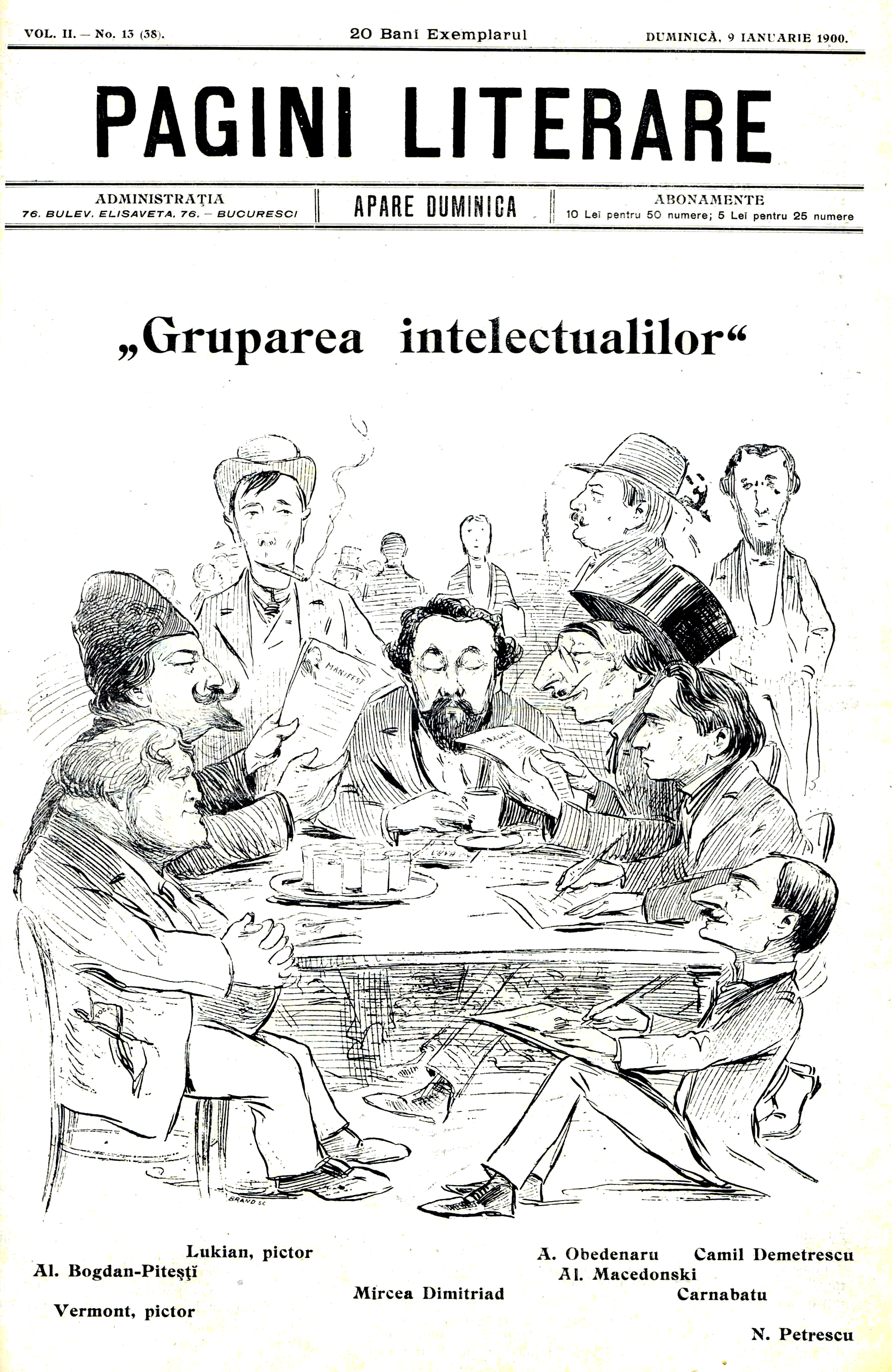 Coperta revistei Pagini Literare „Gruparea intelectualilor” din cafeneaua Kübler. Din grup fac parte (în ordinea în care sunt prezentaţi în desen): Ştefan Luchian, Alexandru Obedenaru, Camil Demetrescu, Alexandru Bogdan-Piteşti, poeţii simbolişti Mircea Dimitriadi, Alexandru Macedonski, D. Karnabatt, pictorul Nicolae Vermont şi Nicolae Petrescu-Găină.